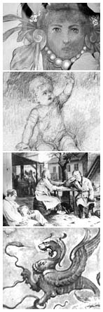 Werke von Franz Lefler (1831–1898)